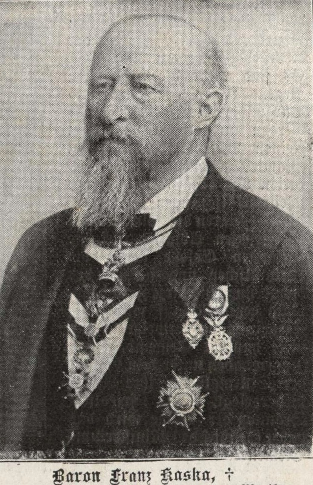 Franz Kaska, Hofapotheker Kaiser Maximilians von Mexiko